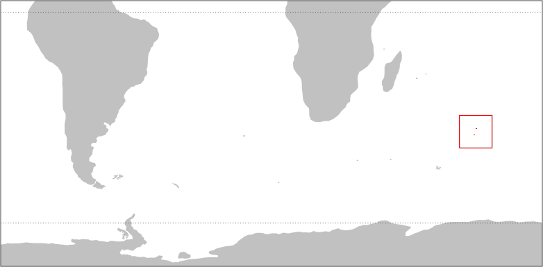 Lage der Île Amsterdam und der Île St. Paul